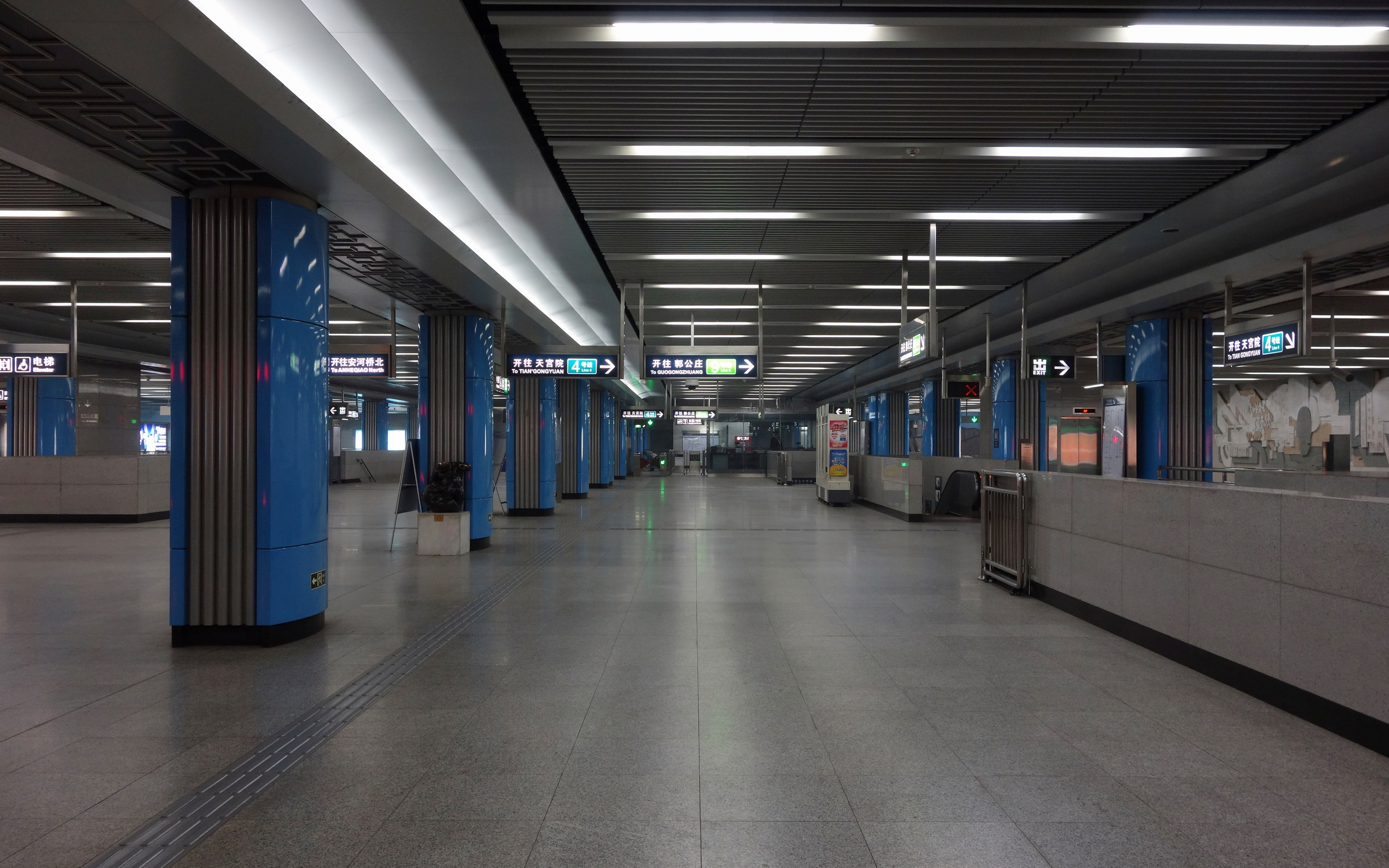 国家图书馆站的站厅层